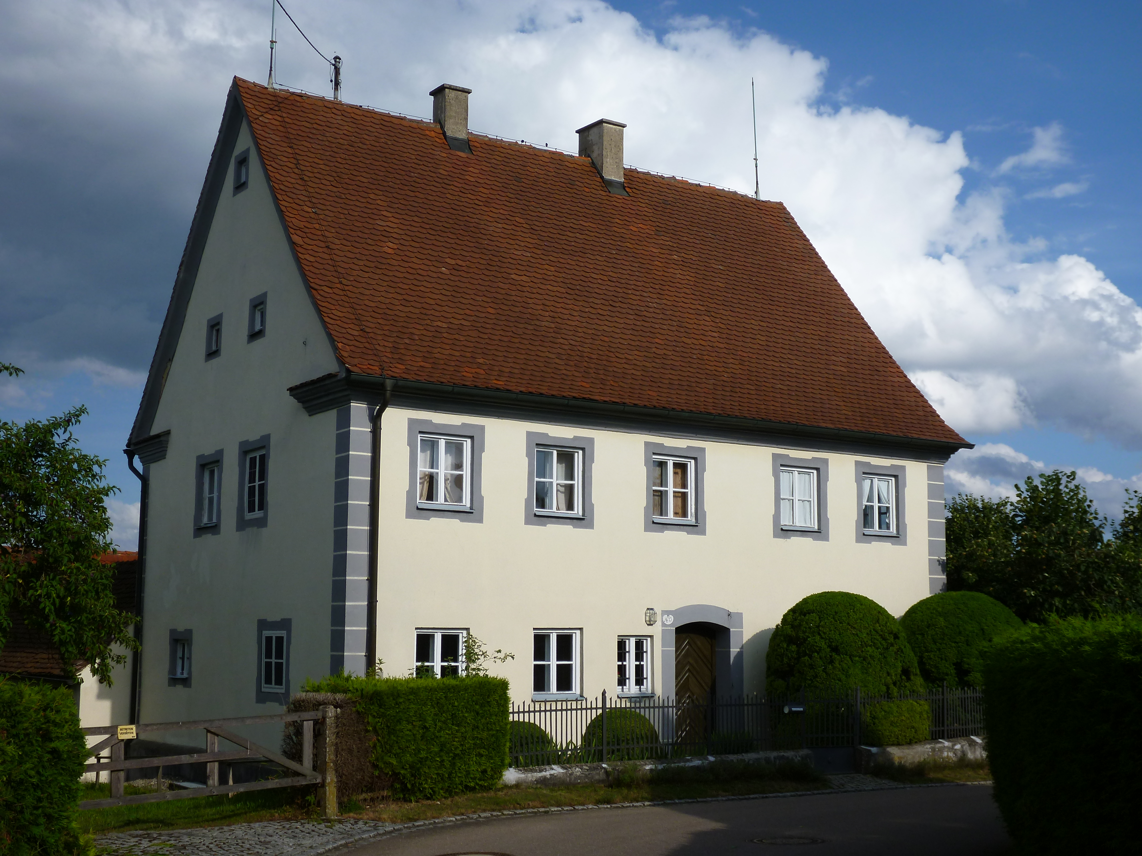 Pfarrhaus Allmannshofen, Satteldachbau, 1. Drittel 18. Jahrhundert; Pfarrstadel, 1. Hälfte 18. Jahrhundert